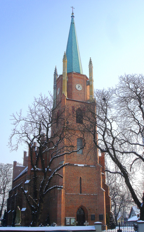 Wrocław, kościół p.w. Wniebowzięcia NMP, ok. 1400, XVI/XVII